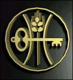 Логотип Агропромбанку «Україна» (Акціонерний комерційний агропромисловий банк «Україна») (1990-2009)